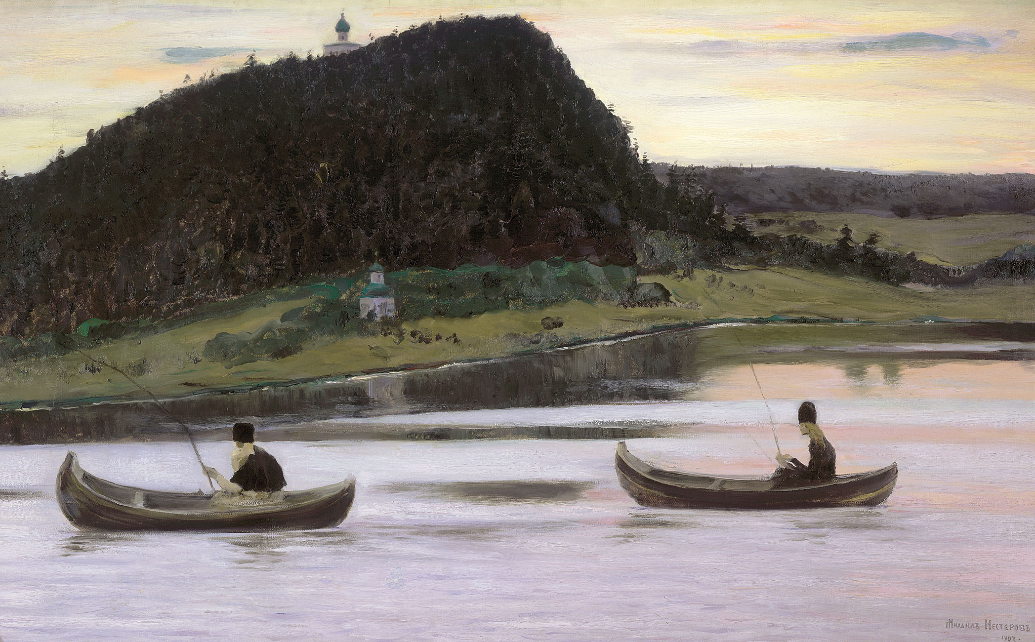 Михаил НЕСТЕРОВ (1862-1942). Молчание. 1903, холст, масло, 71х116 см